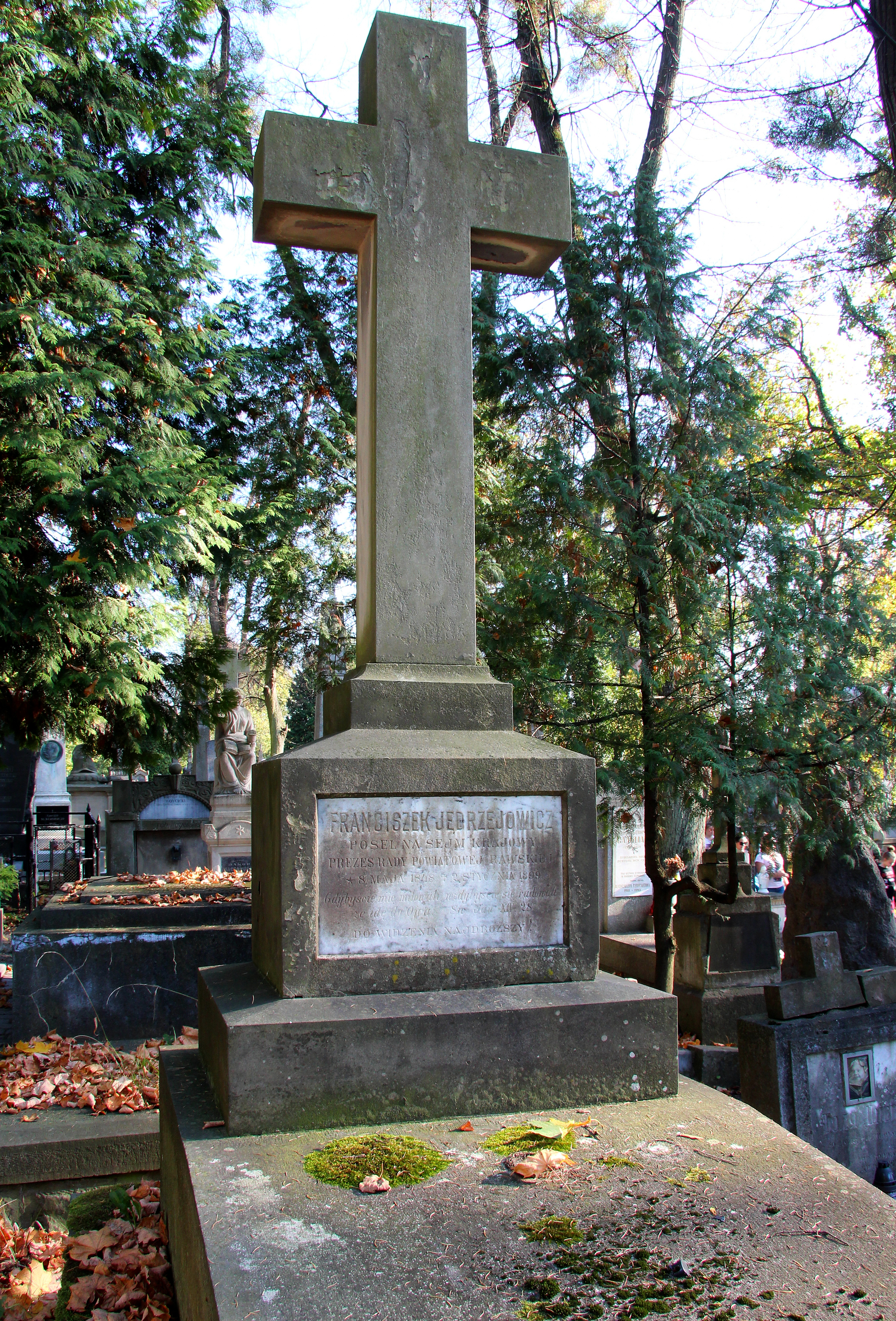 Пам'ятник на могилі Ф.Енджейовича.Личаківський цвинтар , поле № 12.